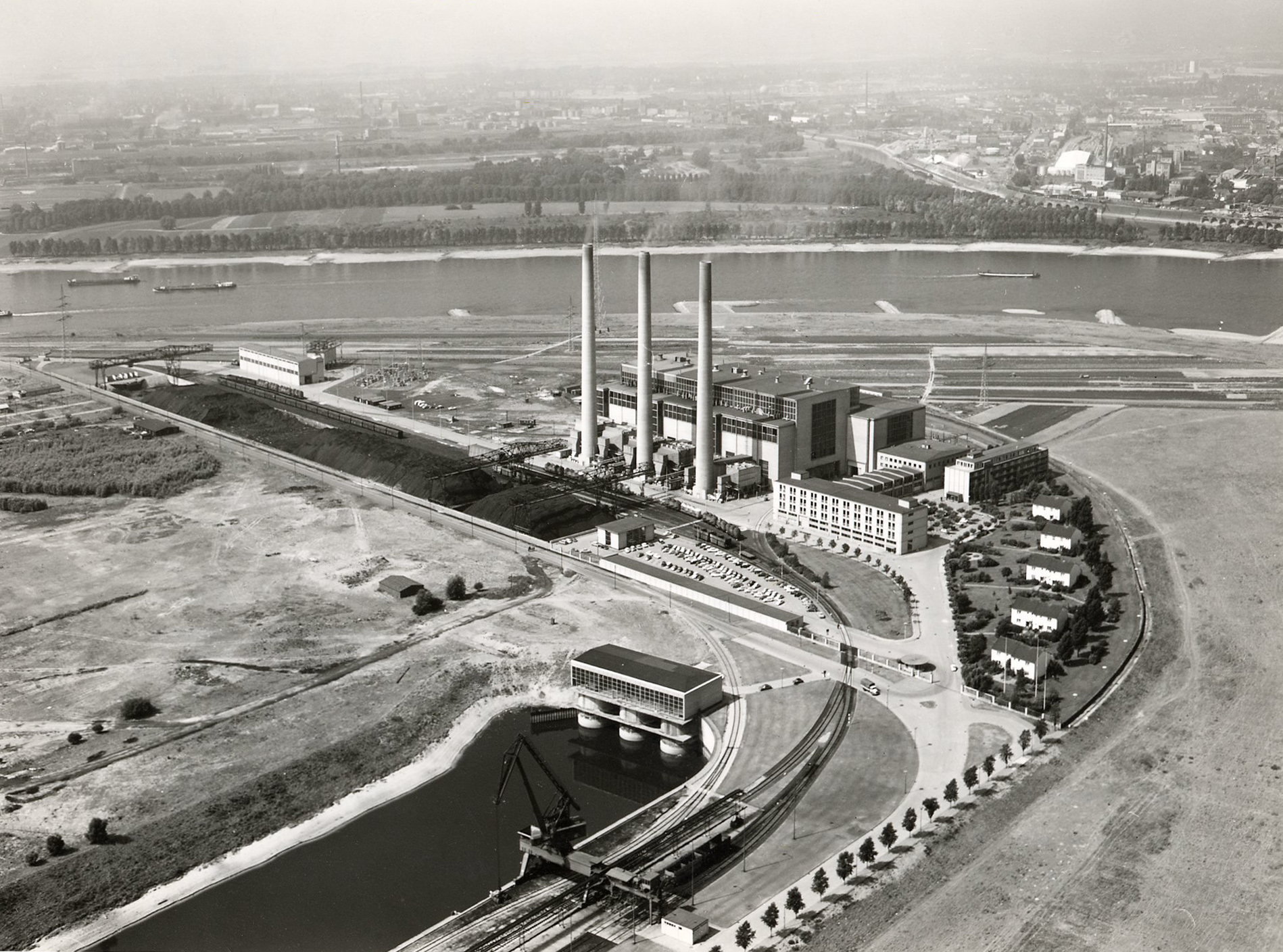 Kraftwerk Lausward in den 1960er Jahren